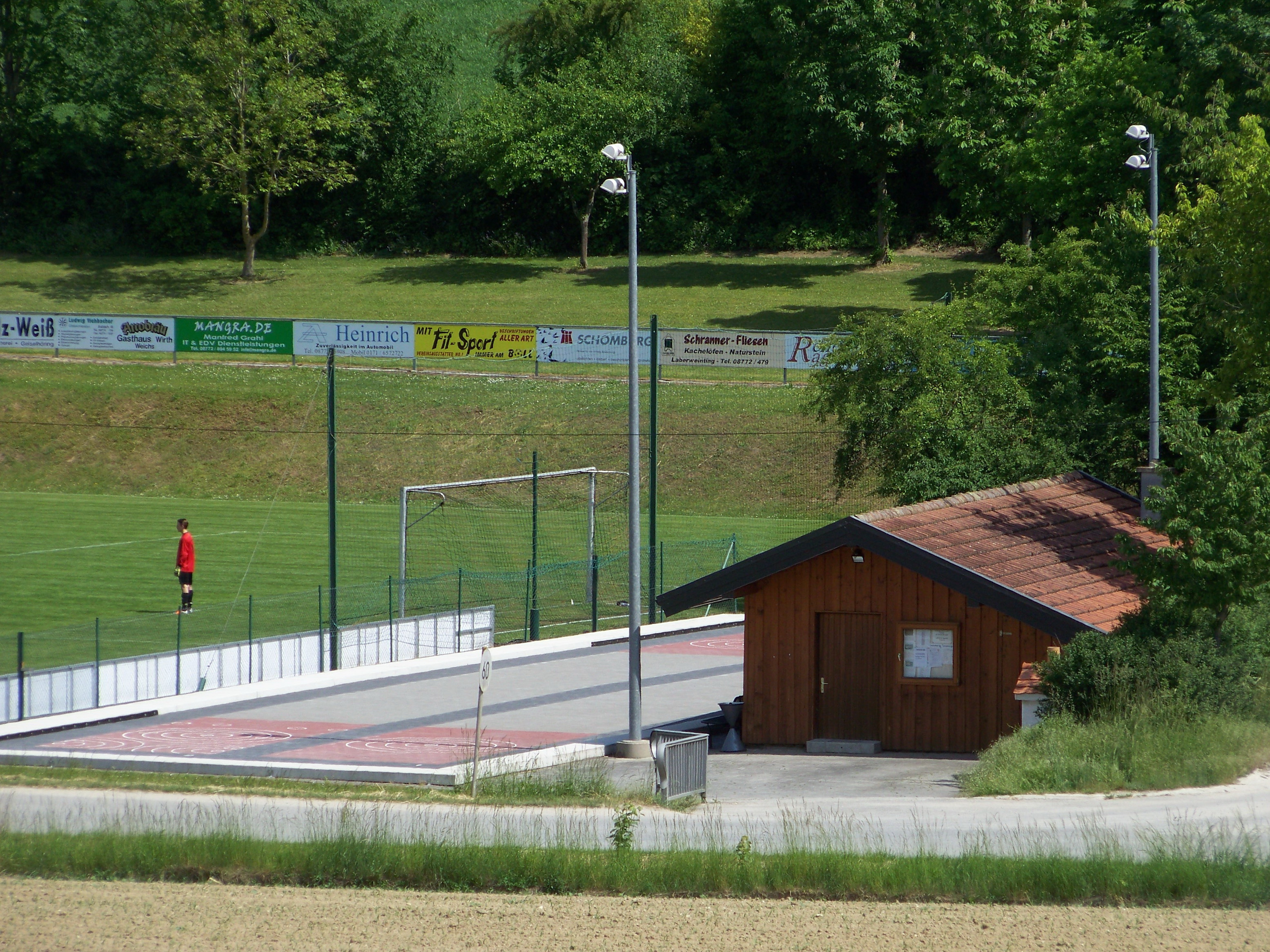 Laberweinting, Hofkirchen. Die Stockbahnen am Sportgelände Poschenhof.